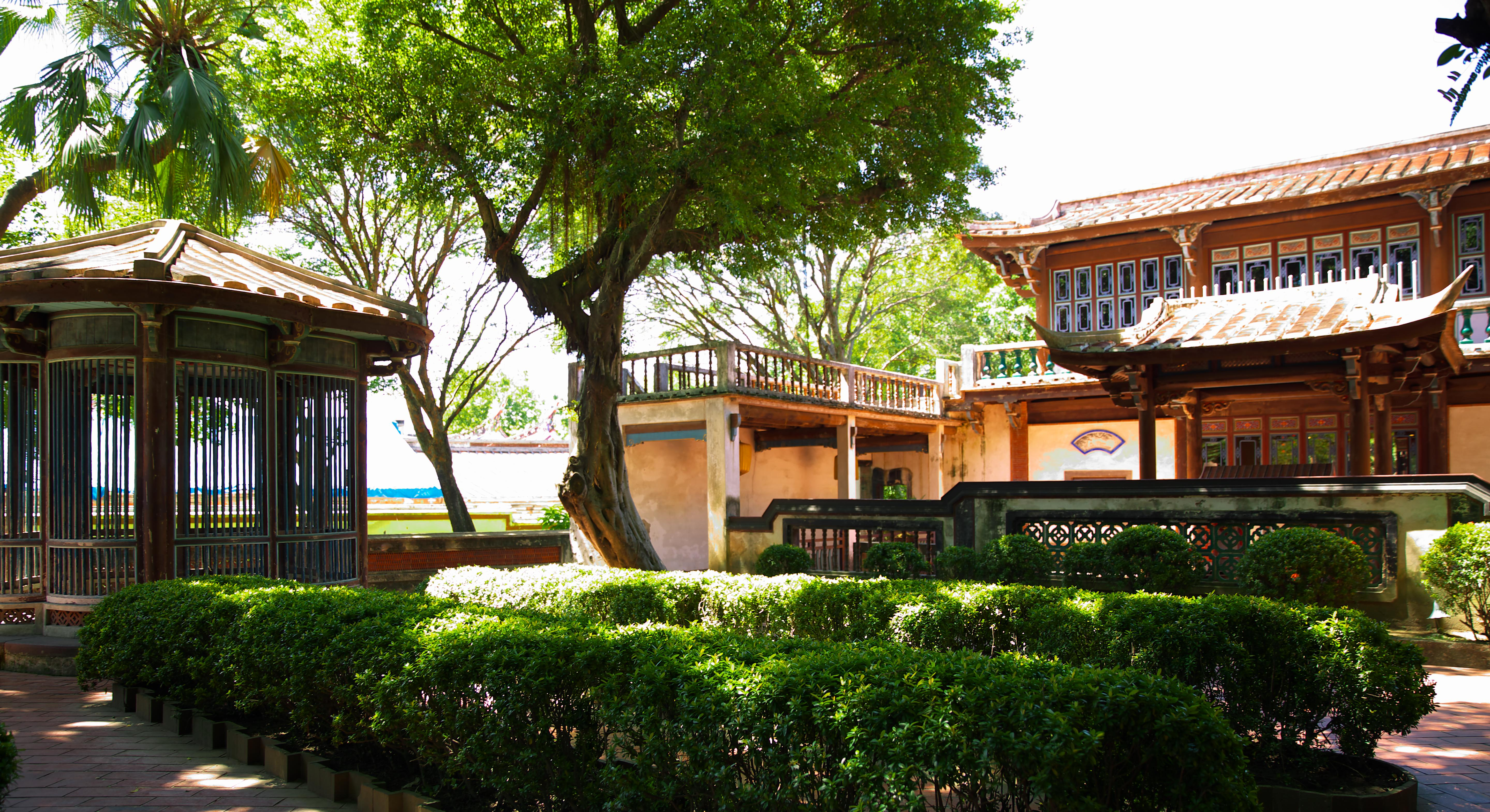 新北市板橋區林本源園邸 Lin's Family Manshion and Garden